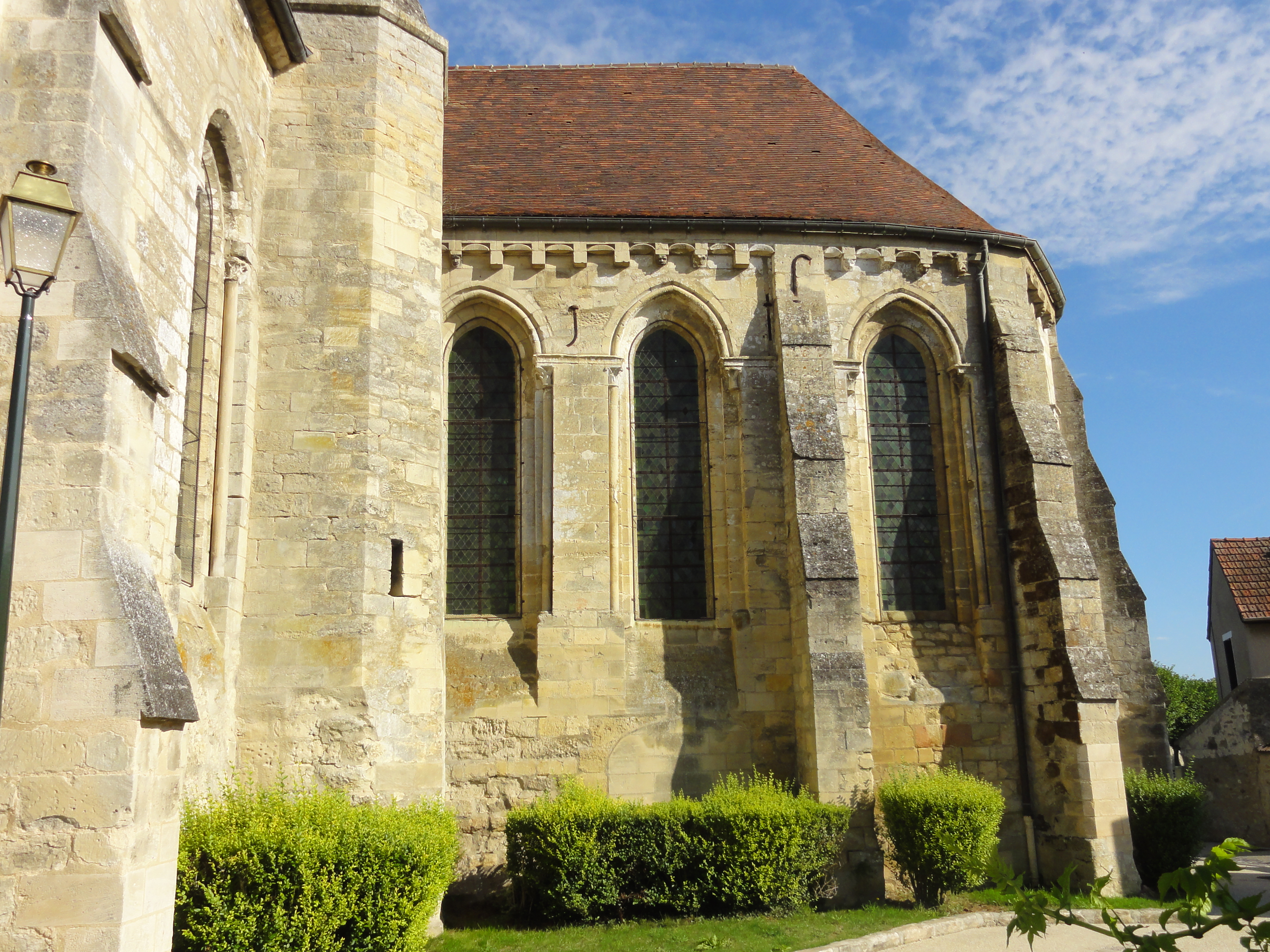 Chœur, côté sud.